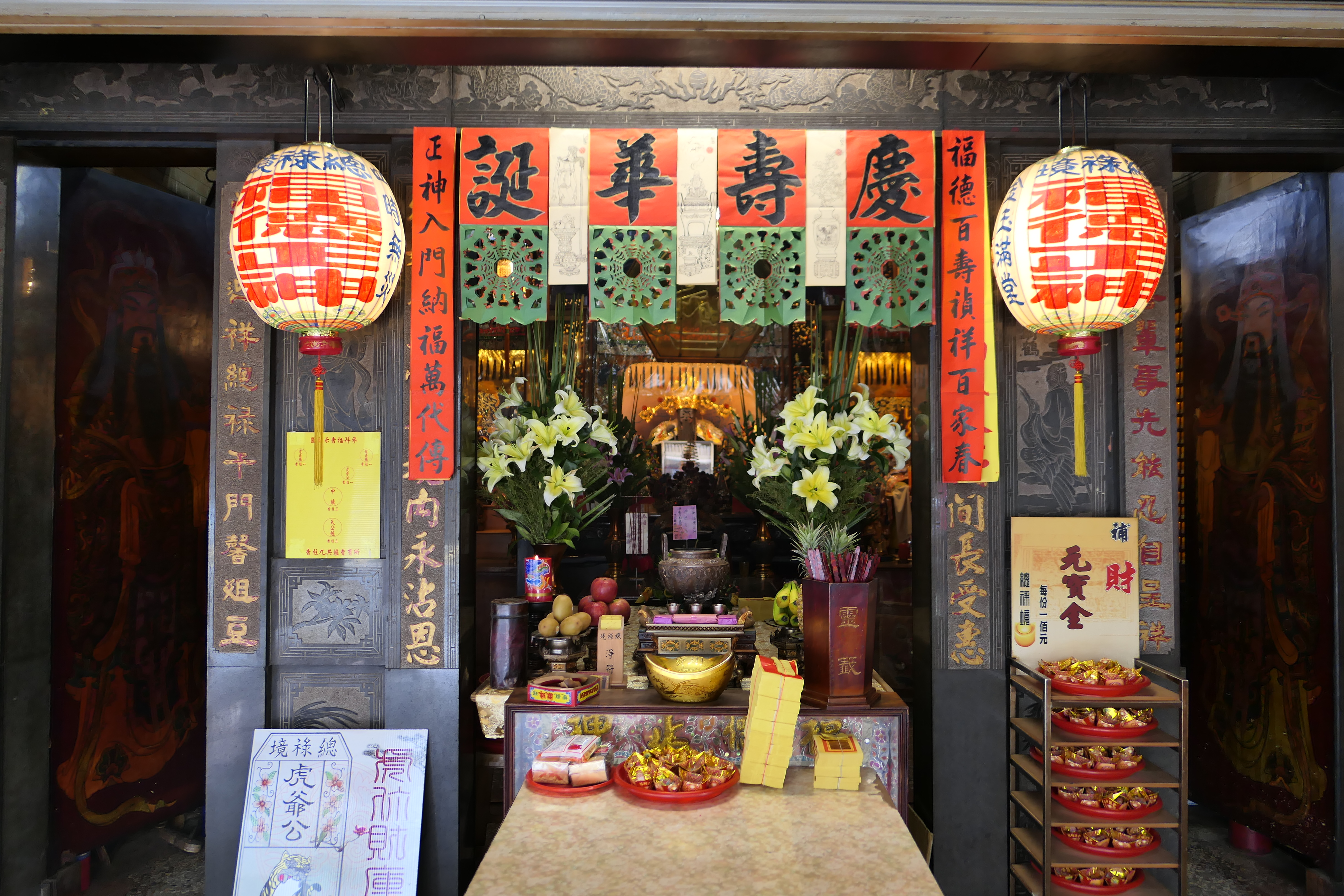 總祿境下土地廟正殿